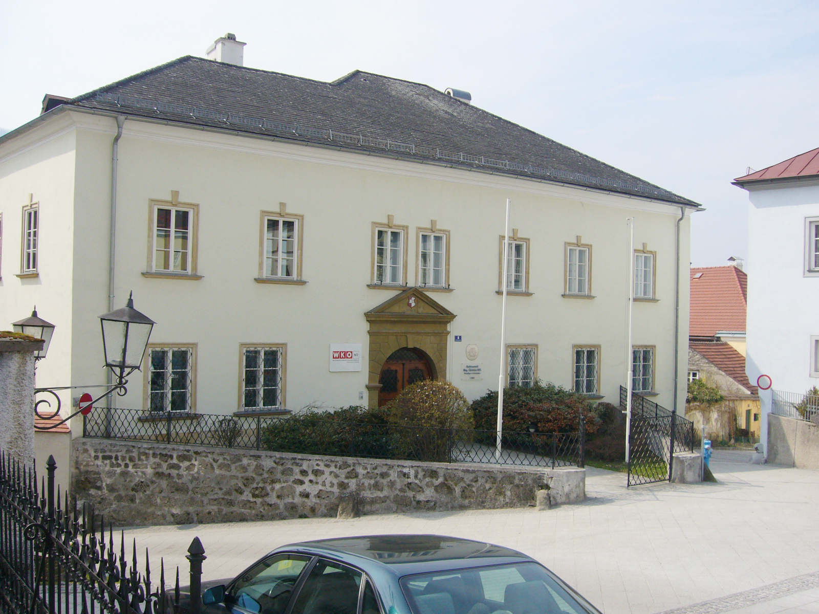 Geburtshaus von Berthold Dietmayr in Scheibbs, Rathausplatz 8